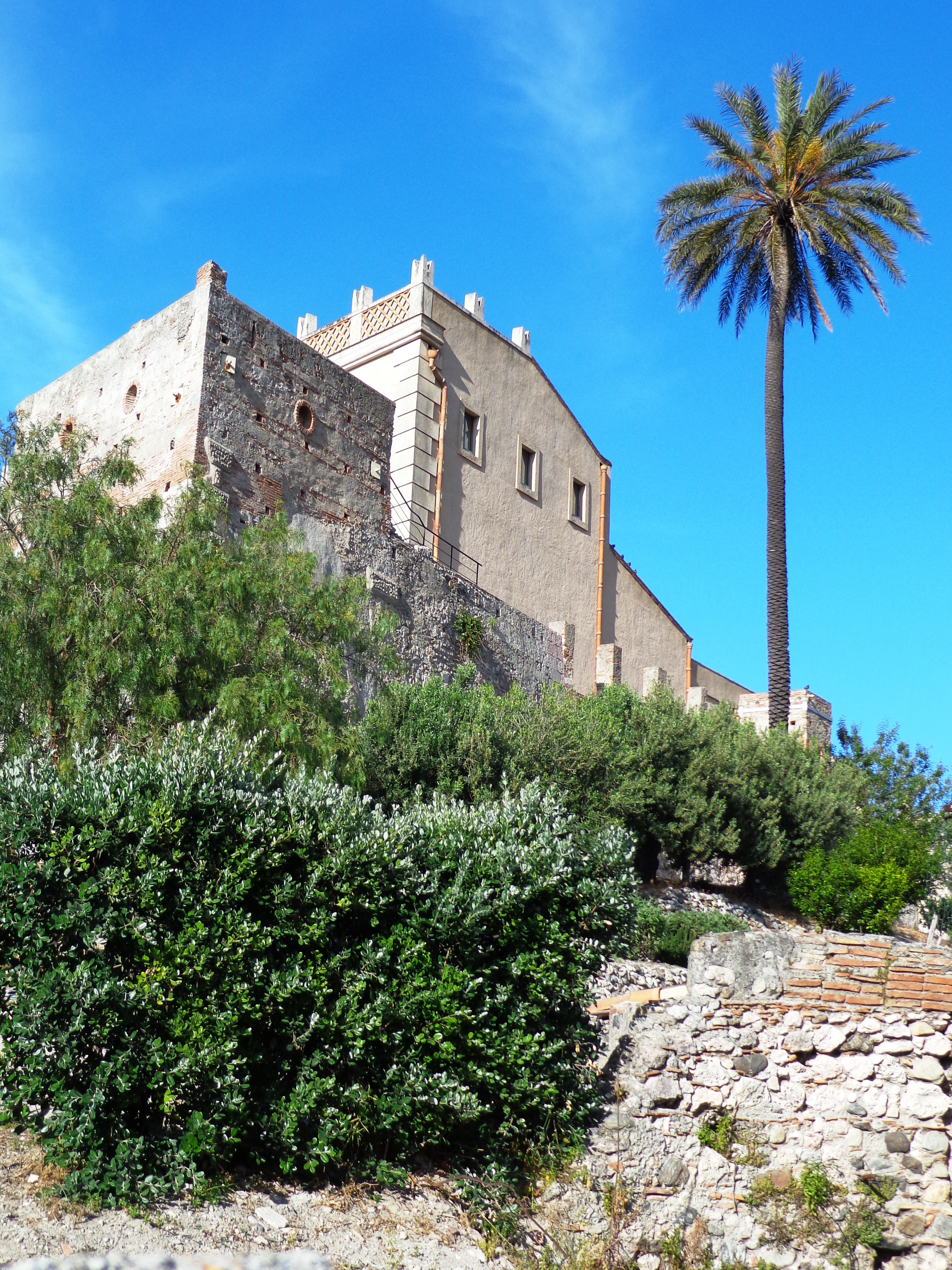 Castello di Bauso This is a photo of a monument which is part of cultural heritage of Italy.